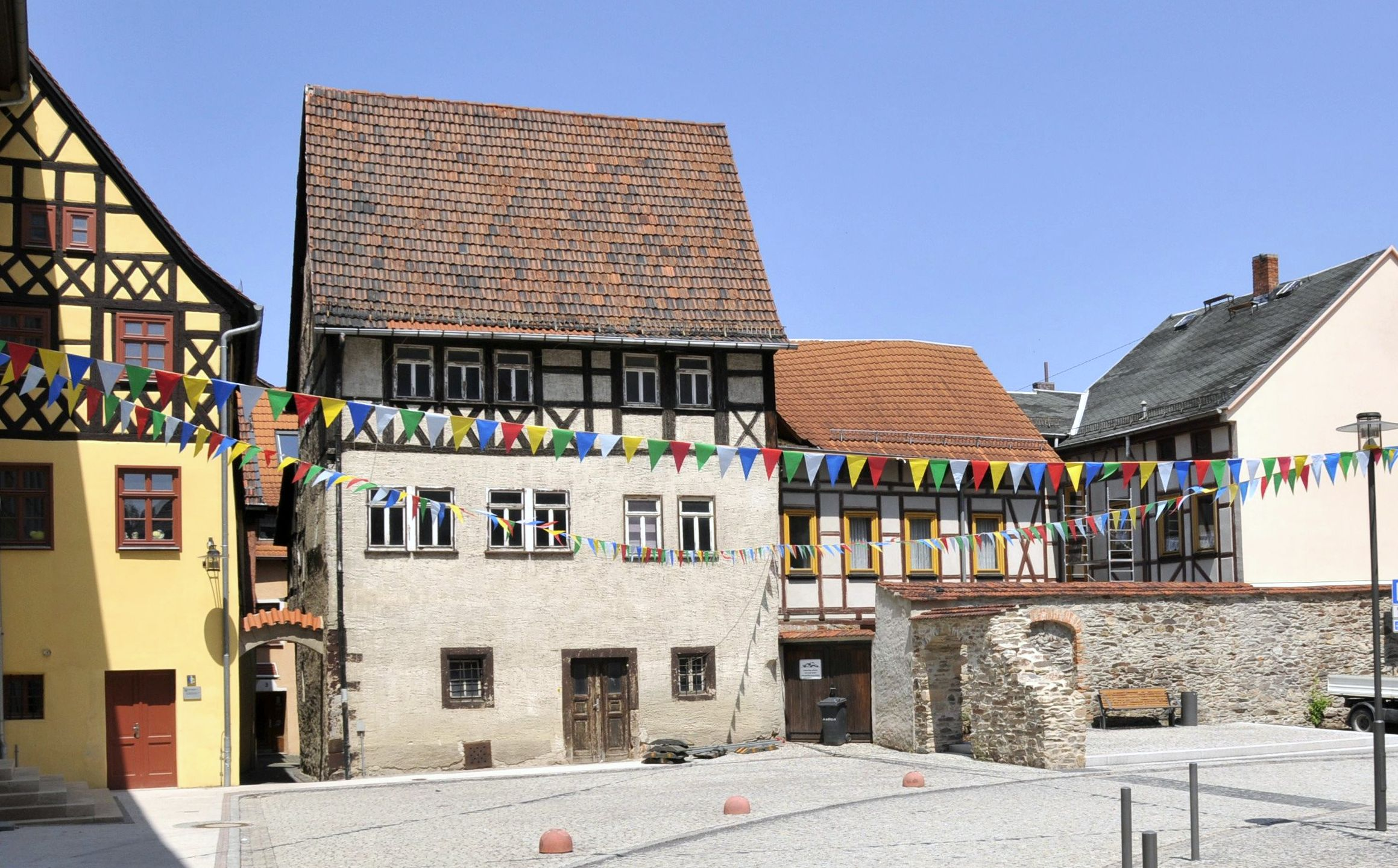 Vorplatz der Johanniskirche in Neustadt an der Orla